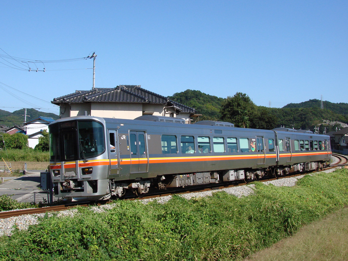 JR西日本キハ127系